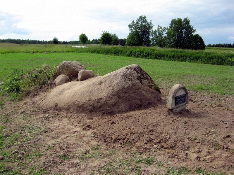 Камяніца. Вялікі Камяніцкі камень